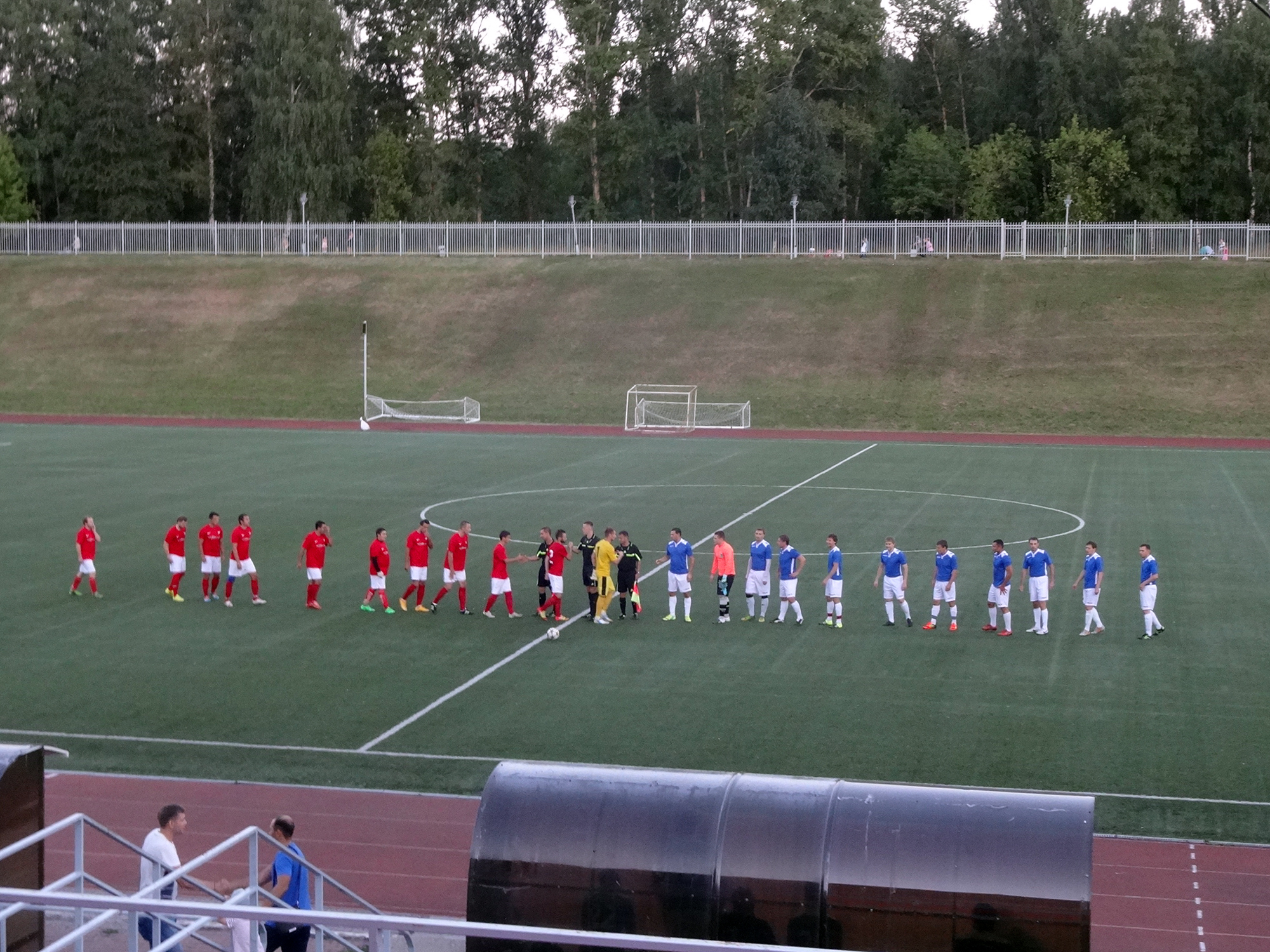 Команда "Нефтяник" (Ярославль) в синей форме готовится к игре с командой "Текстильщик КСП" (Красные Ткачи) в красной форме. 11 августа 2016 года. Стадион "Славнефть". Открытое первенство города Ярославля.